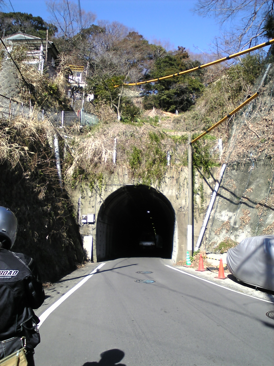 国道134号脇の小坪トンネル